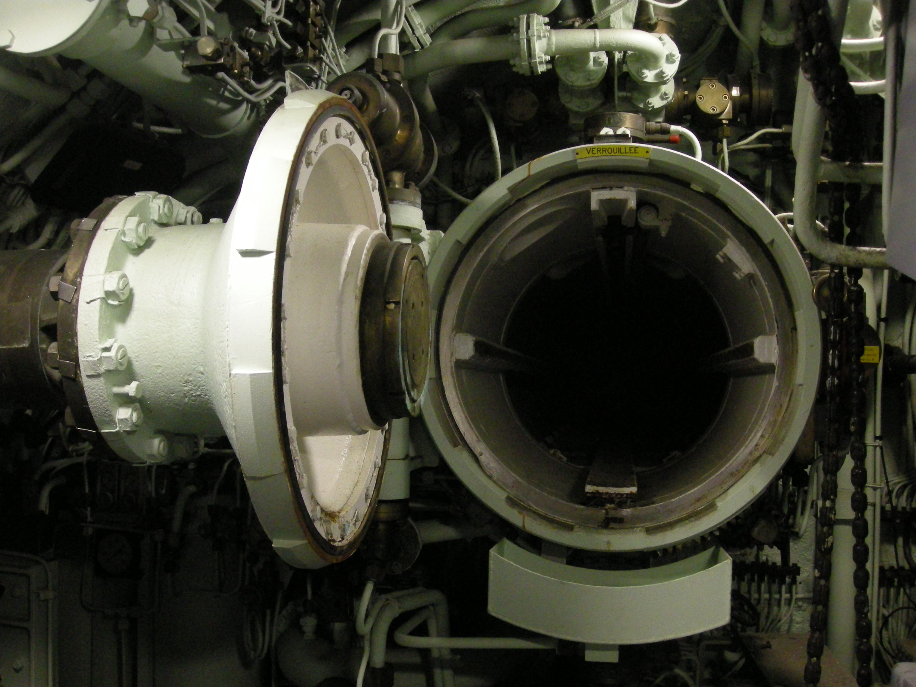 Lance-torpilles, sous-marin Redoutable à la Cité de la Mer de Cherbourg